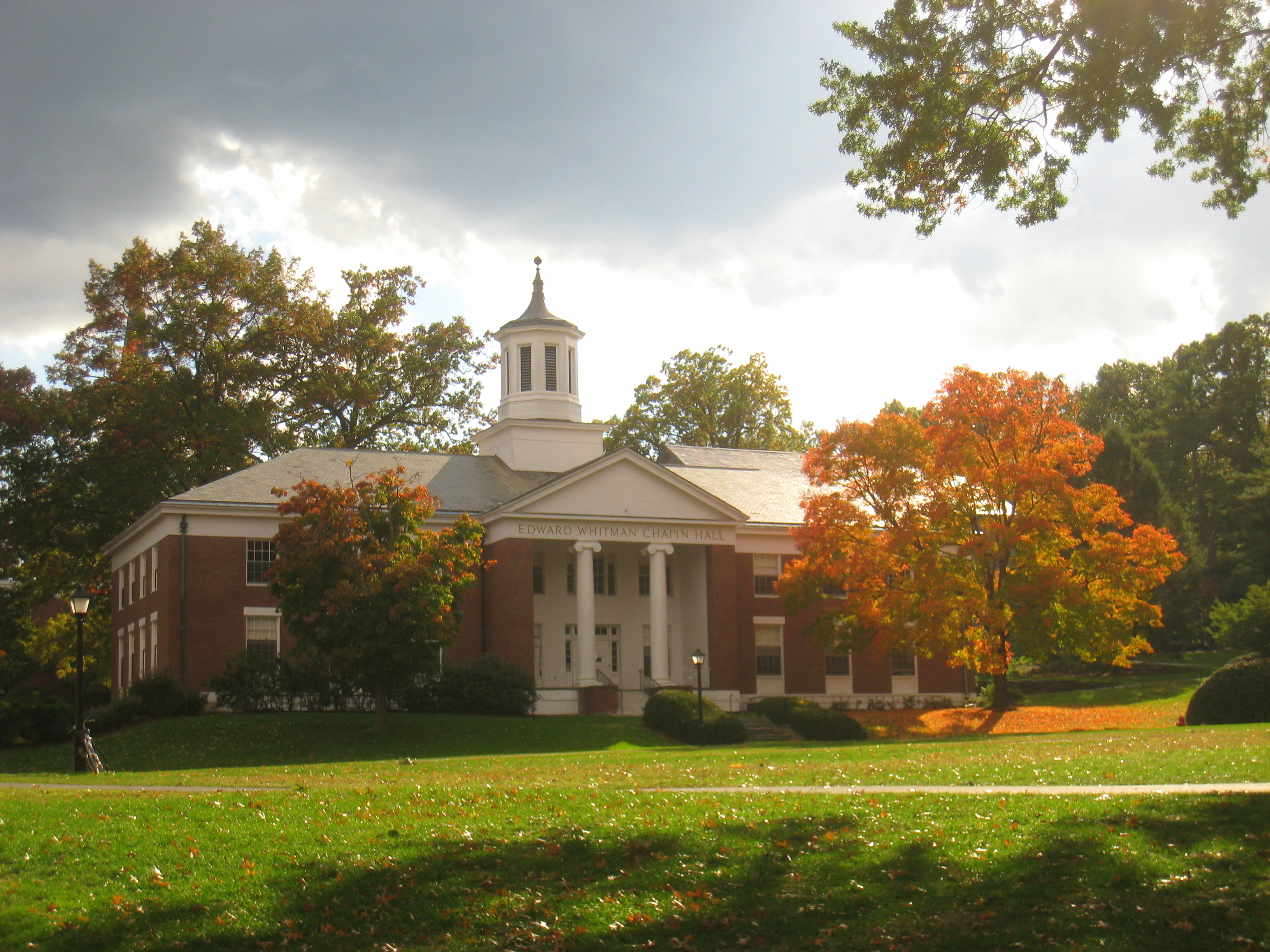 Amherst College, Amherst, Massachusetts, USA.